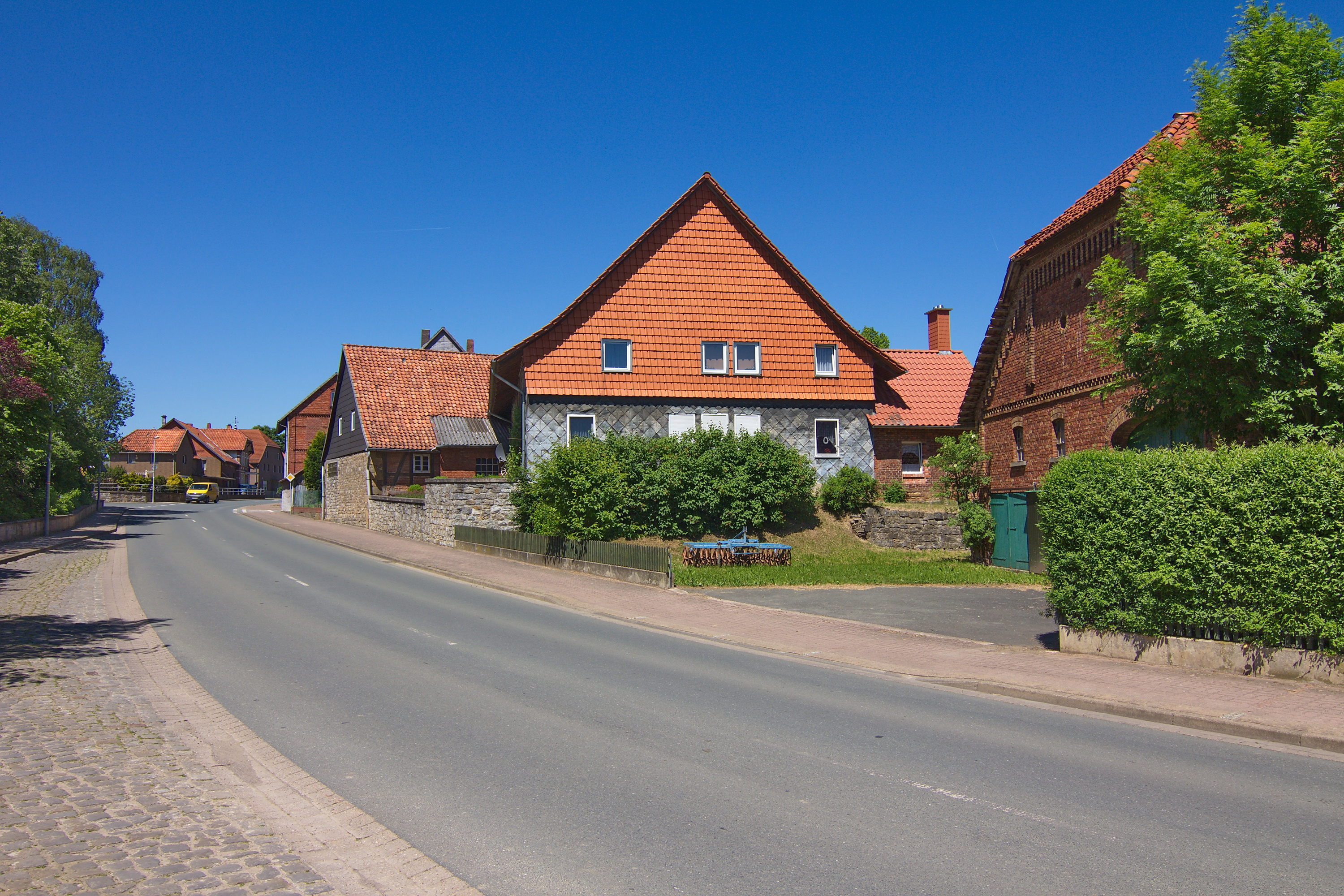 Ortsblick in Beber (Bad Münder), Niedersachsen, Deutschland.